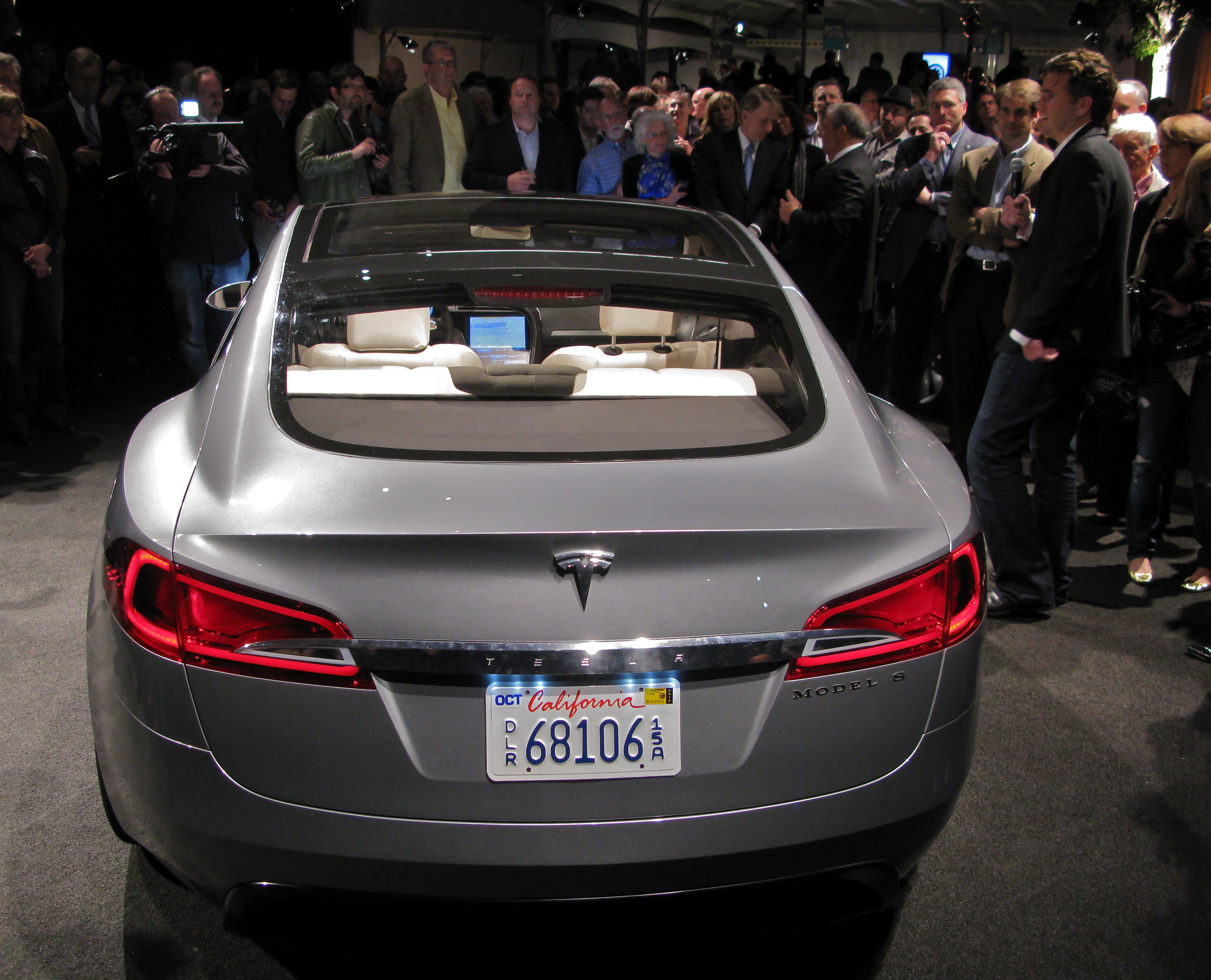 Tesla S sedan